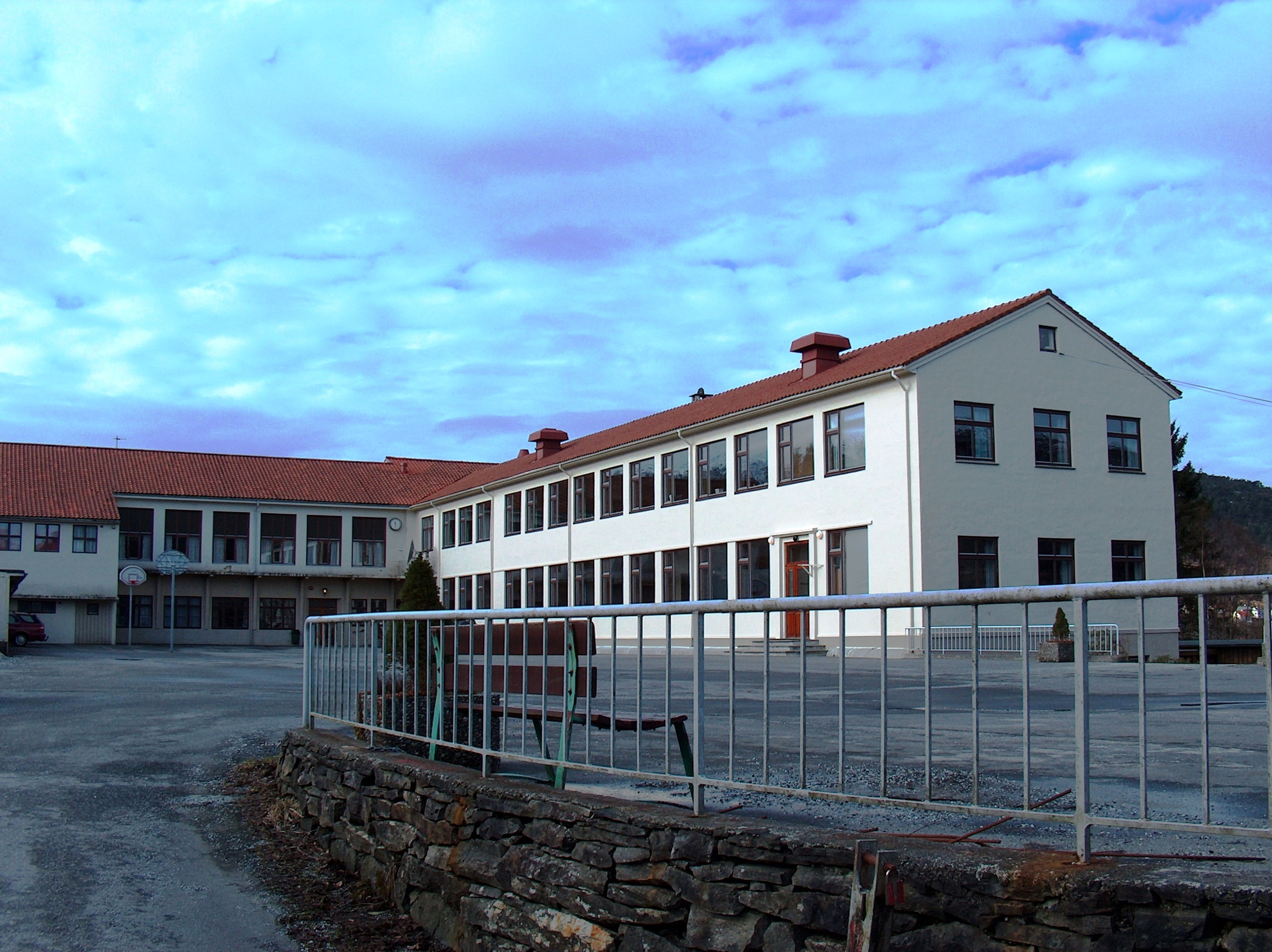 Garnes vidaregående skule, avd. Garnesstølen